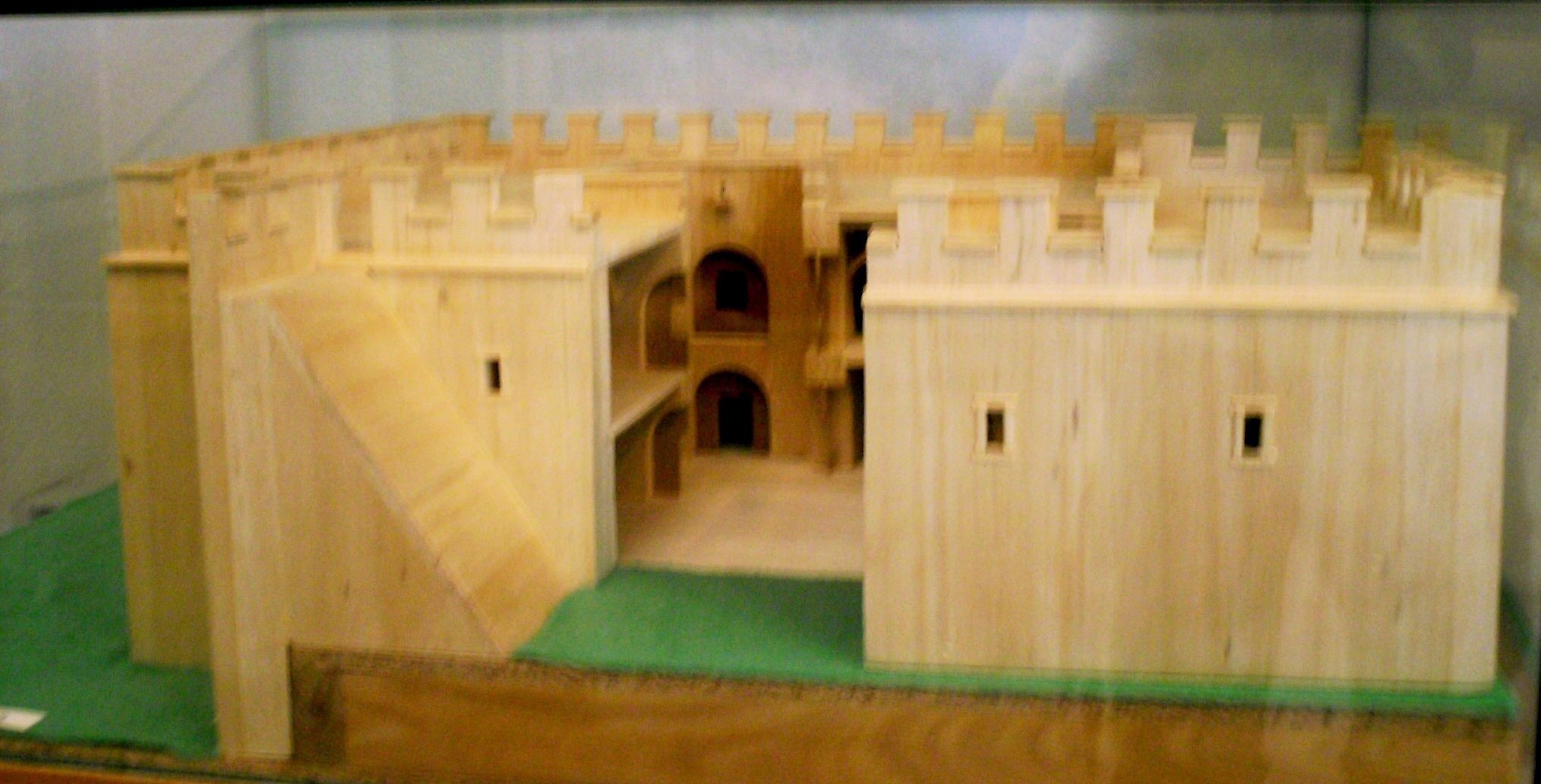 Aufgeschnittenes Rekonstruktionsmodell des Burgus von Zeiselmauer (Ansicht von Süd)